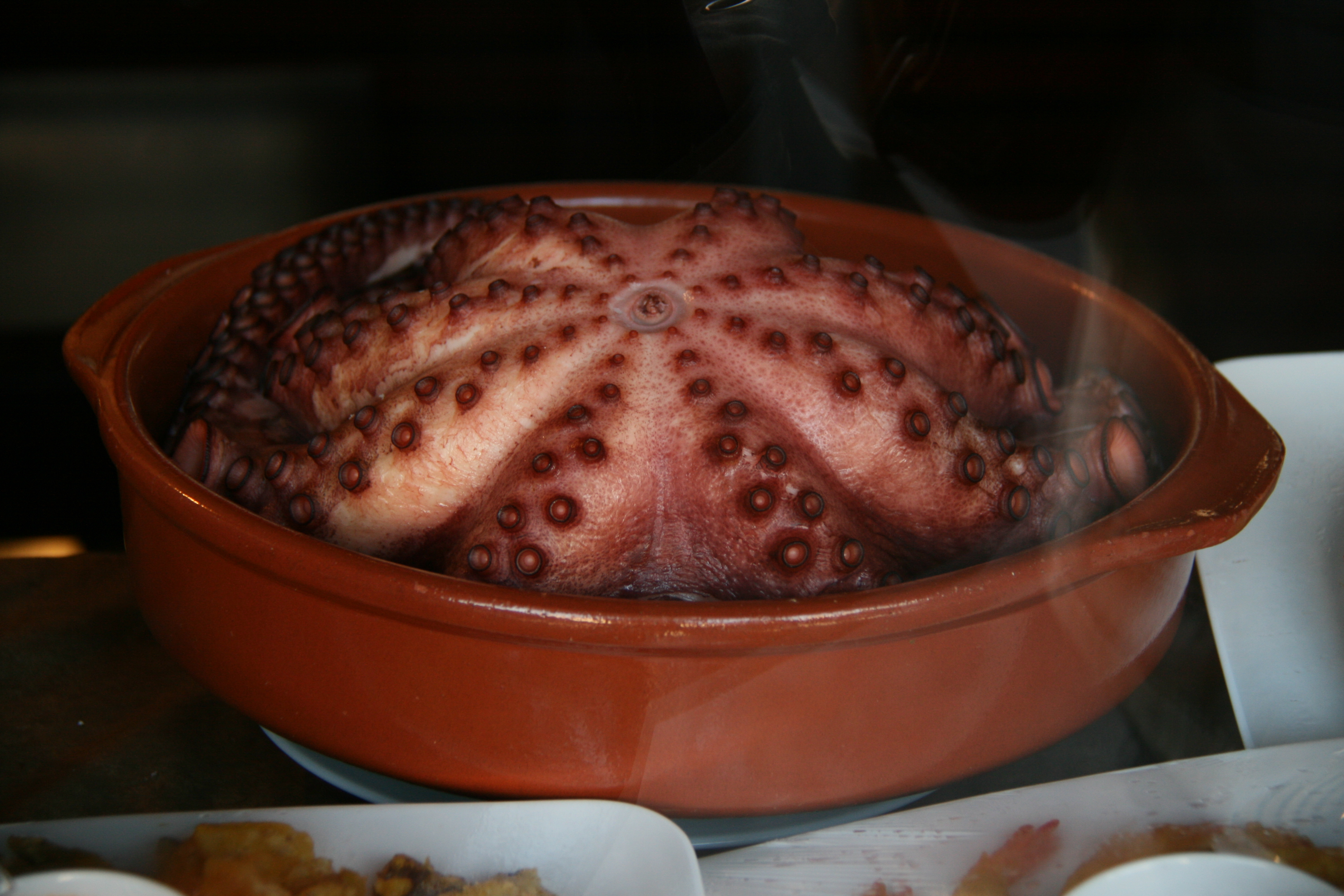 Pulpo